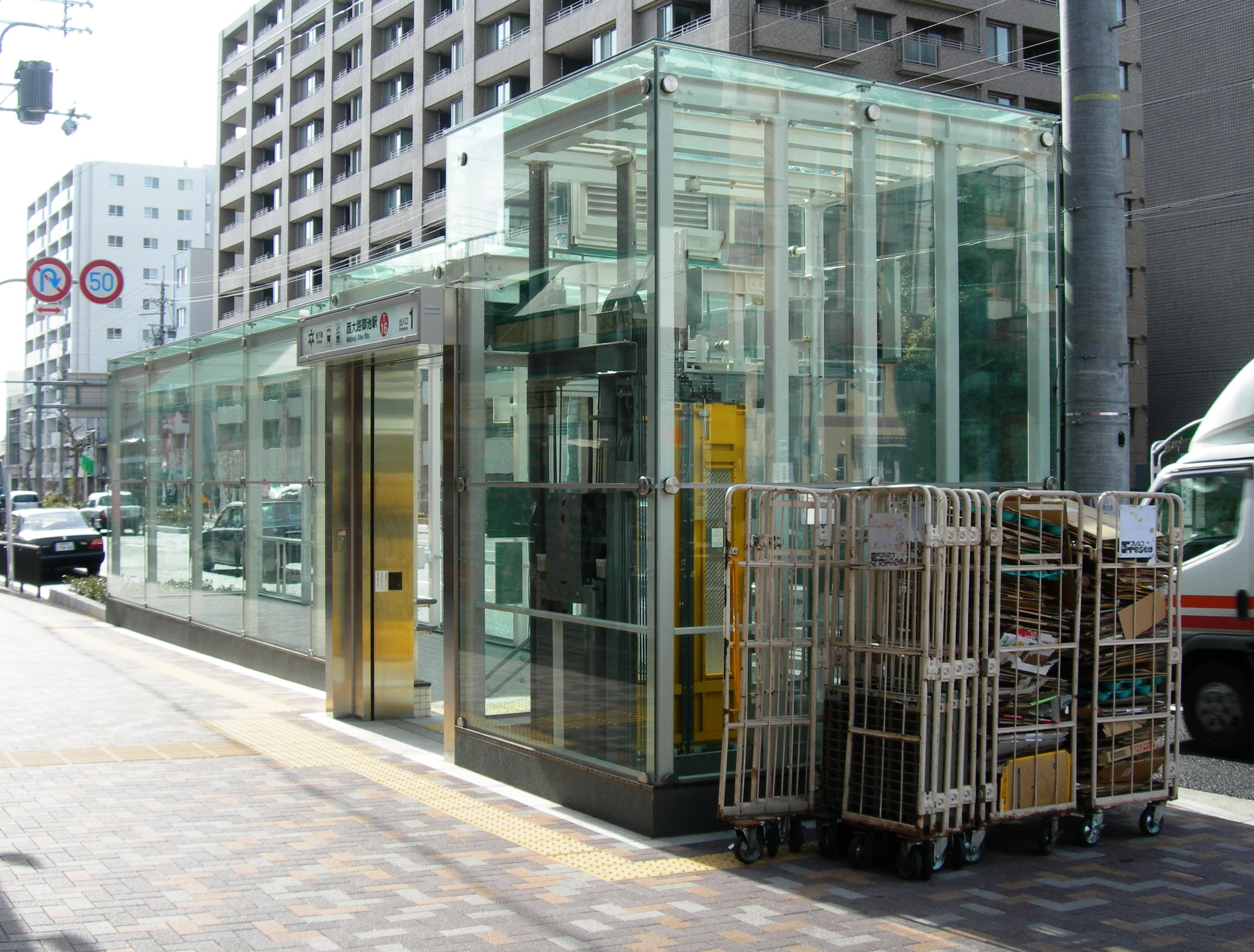 京都市営地下鉄東西線西大路御池駅1番出口